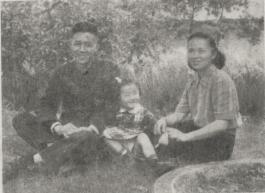 婚姻和家庭的故事 作 者 ：新中国妇女社辑 出版发行 : 新中国妇女社 , 1955.08 页码 16